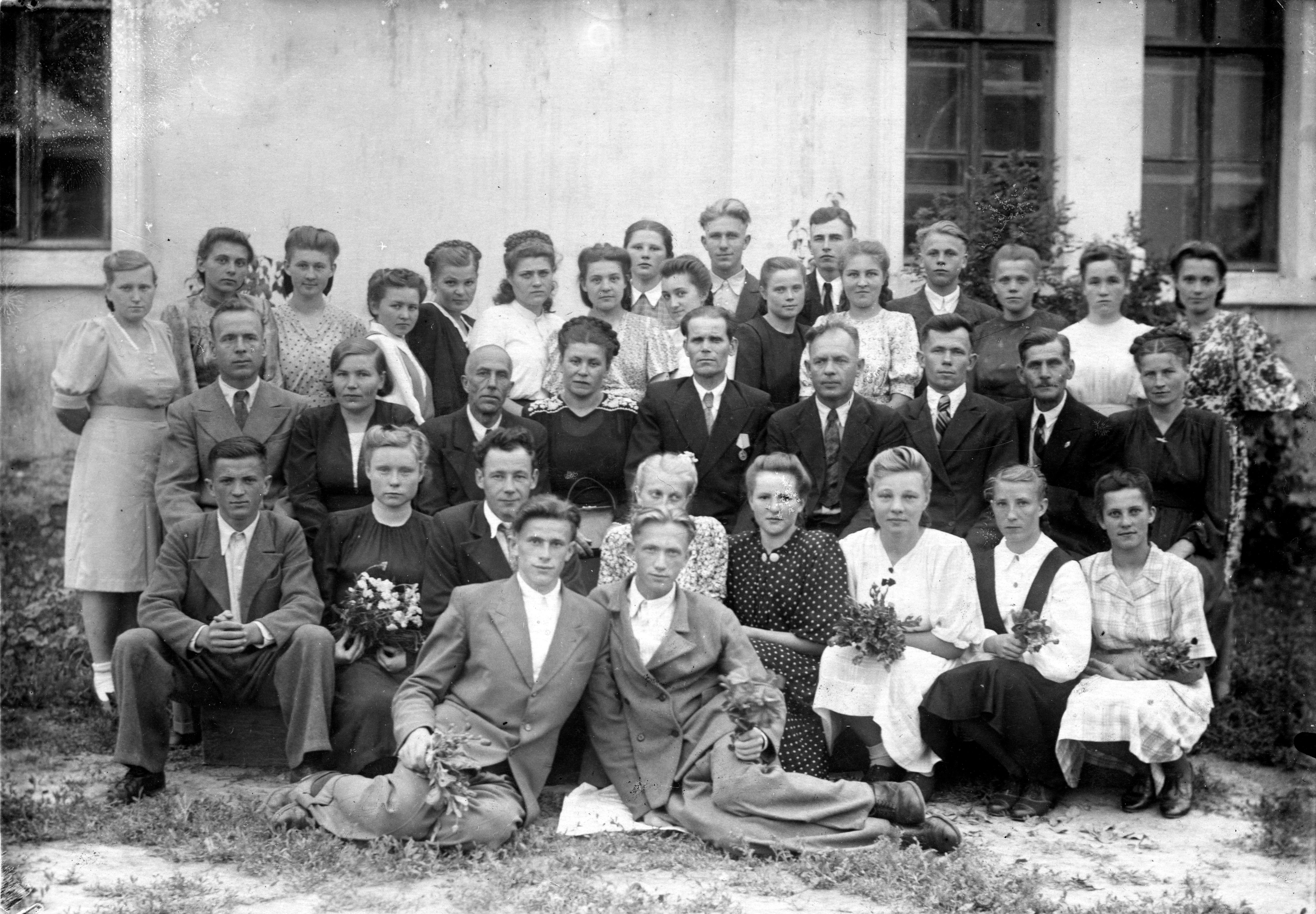 1948 ученики перед Школой Шольца